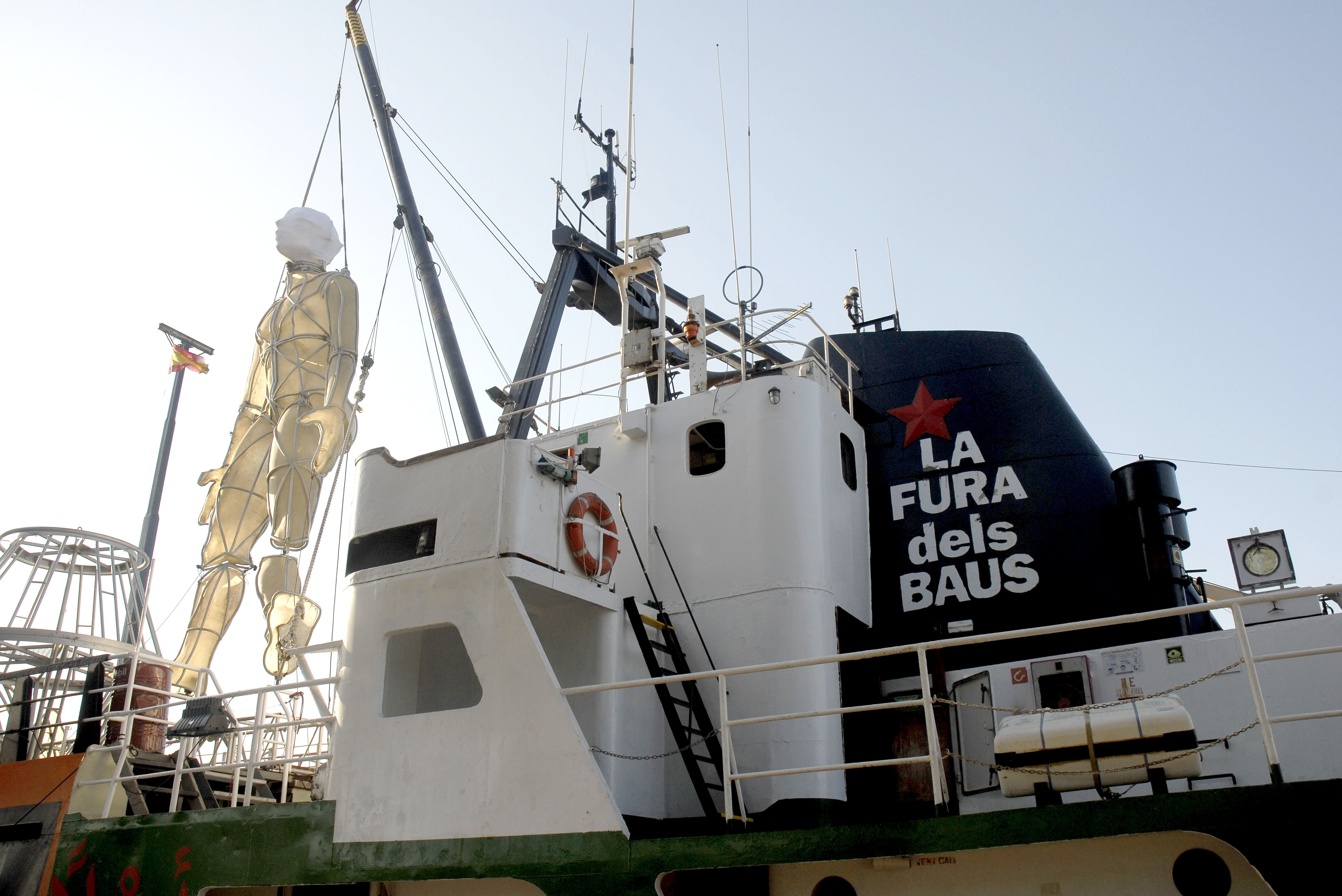 Naumon, buque de la compañía teatral La Fura dels Baus . Atracado en el cargadero del Mieneral, Melilla., 11 de agosto del 2008.